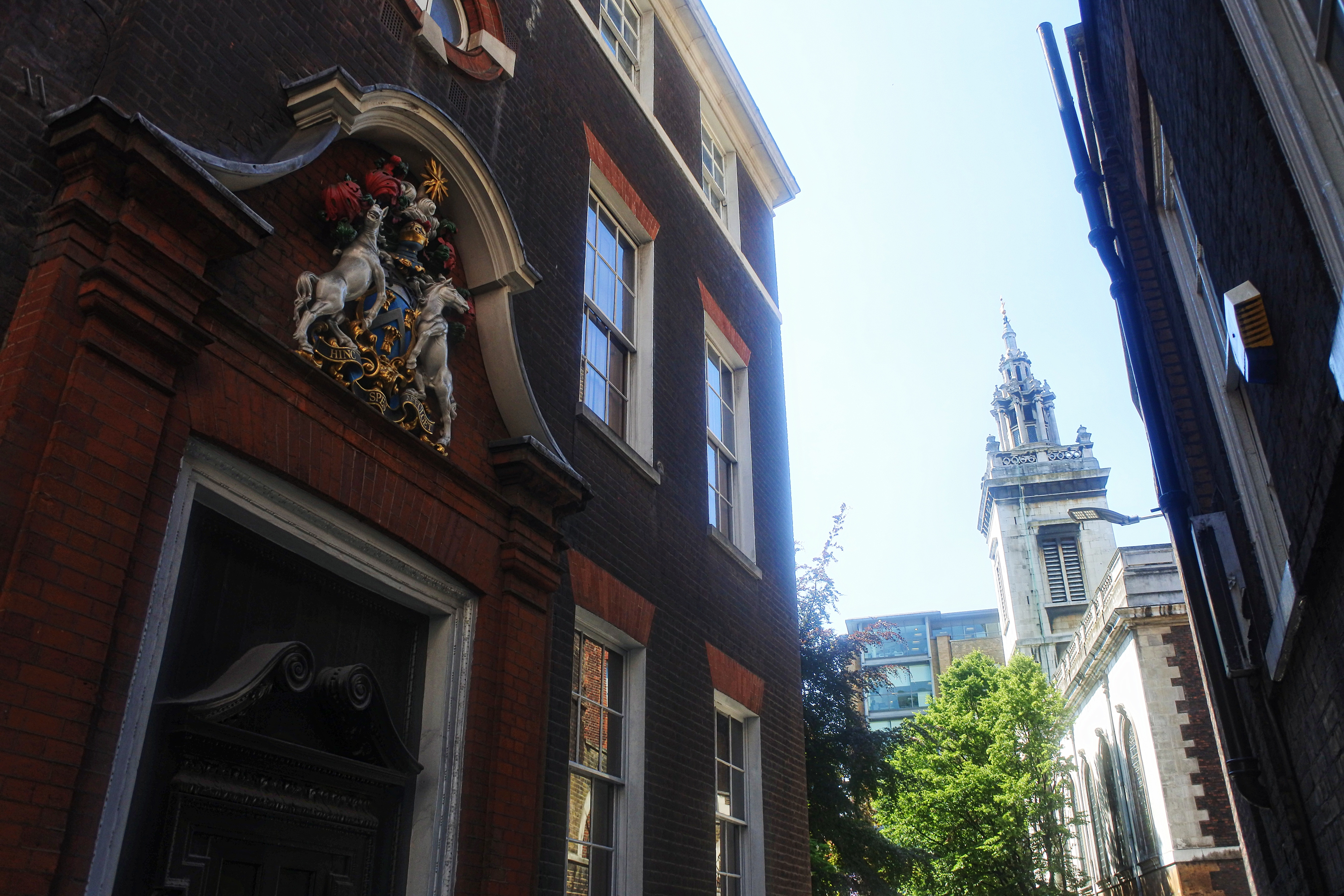 College Street, London EC4